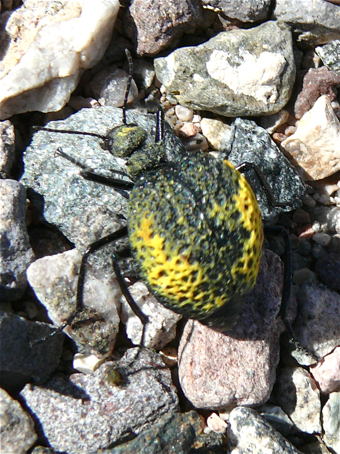 Cysteodemus armatus AKA Desert Spider Beetle